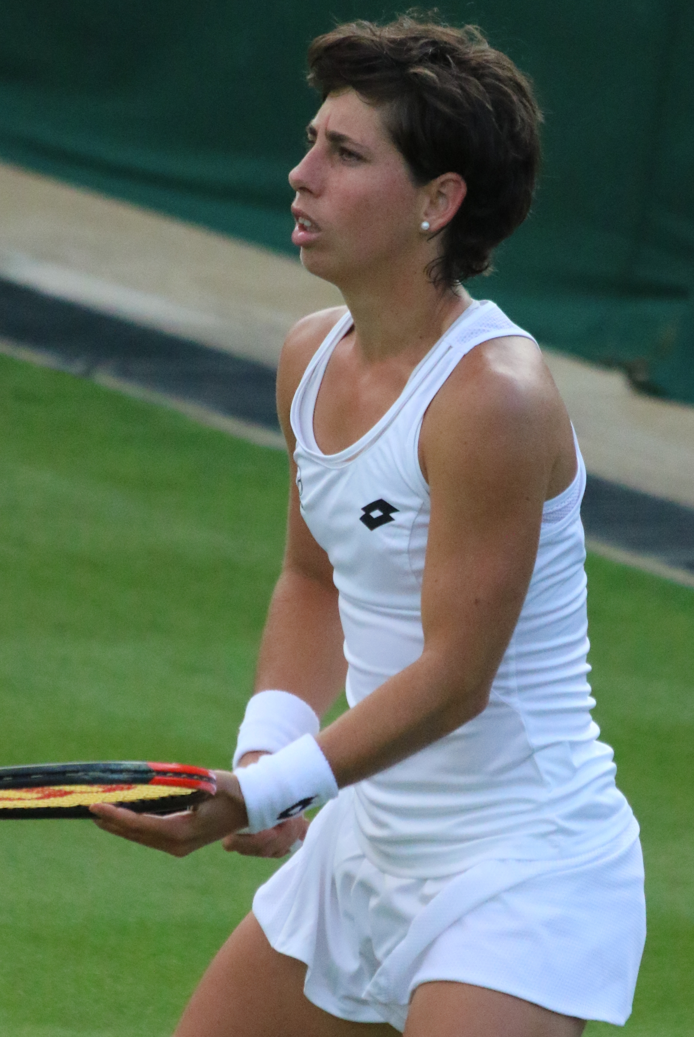 Suarez Navarro WM17 (3)